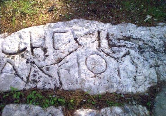 כתובת תחום גזר שצולמה ליד כרמי יוסף, ביער, מחוץ לתחום היישוב ורחוק מתל גזר ו\או עין ירדה.